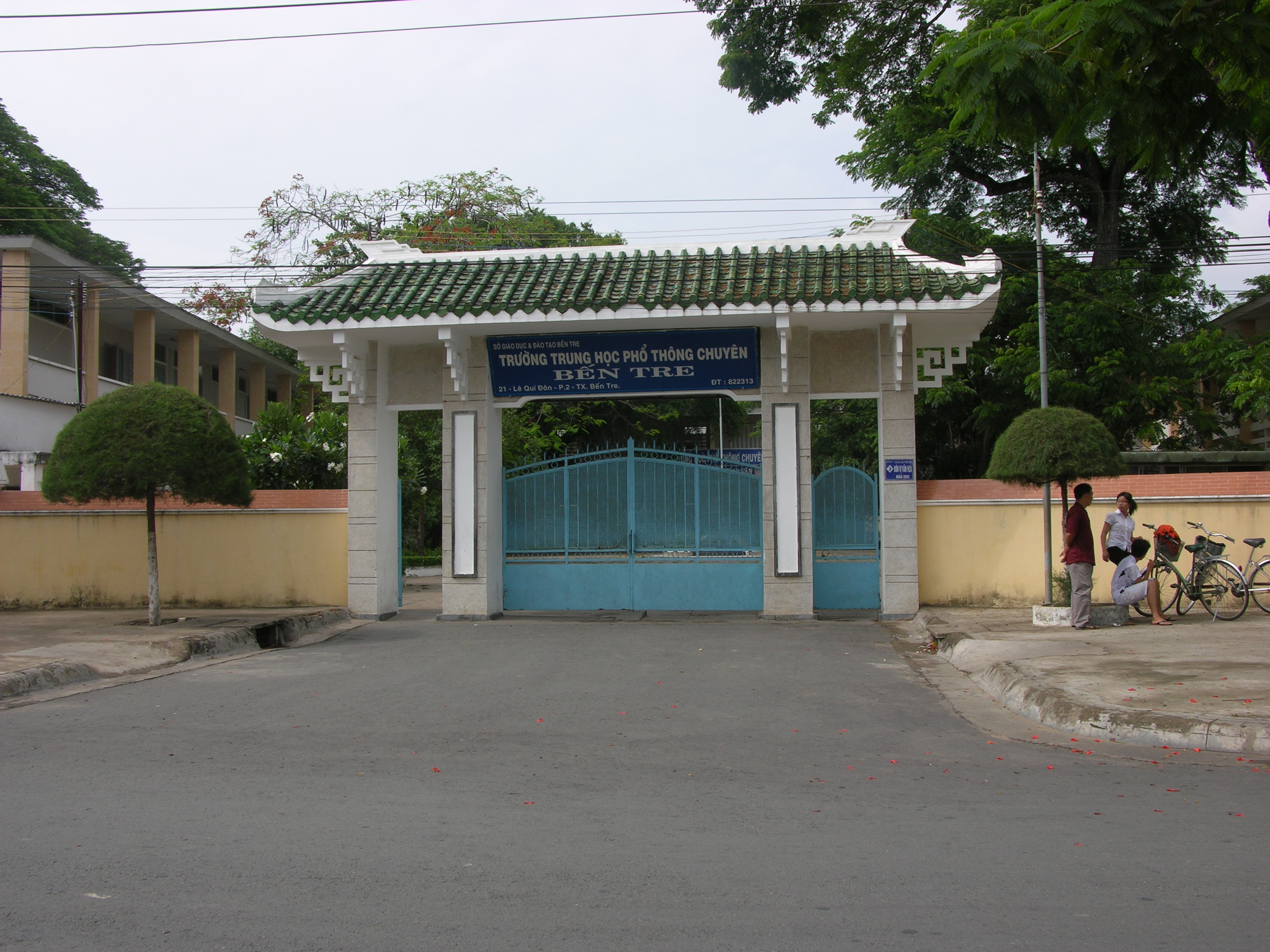 Cổng trường Phổ thông Trung học chuyên Bến Tre, thị xã Bến Tre, tỉnh Bến Tre.